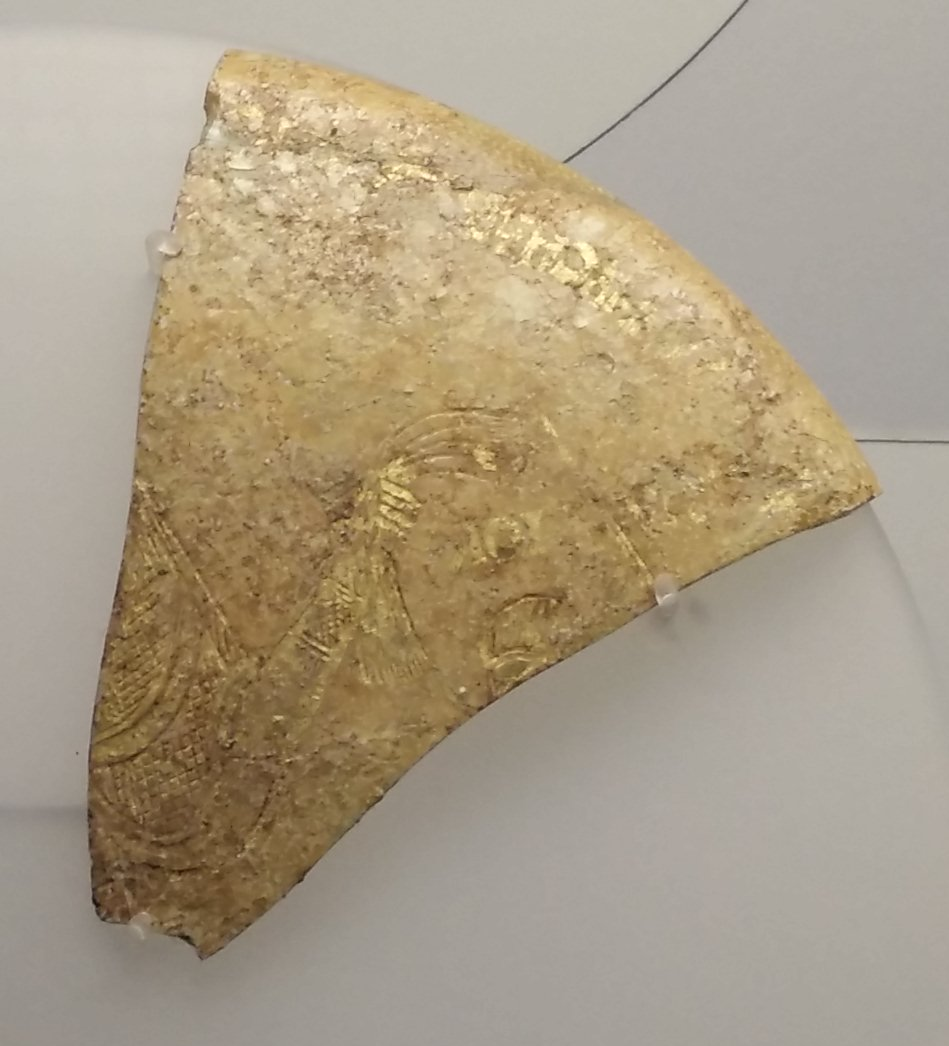 Frammento di piatto di Quinto Aurelio Simmaco, raffigurante il console che regge la mappa per dare il via ai giochi; è raffigurato anche il figlio, Quinto Fabio Memmio Simmaco iunior. Dalla Crypta Balbi, Roma.